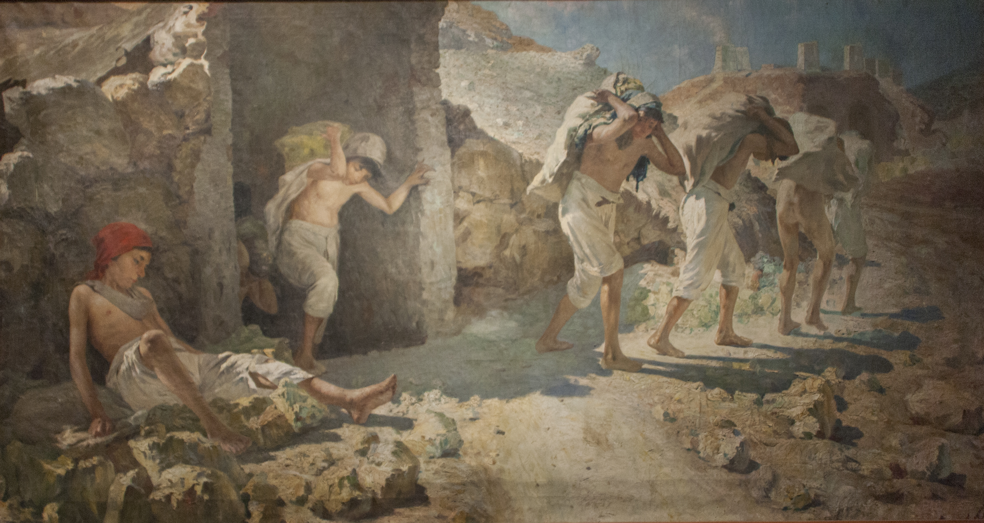 I carusi - Onofrio Tomaselli olio su tela 1905